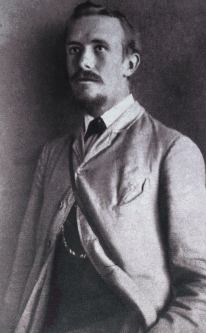 Carl Schuchhardt in Pergamon (1885)